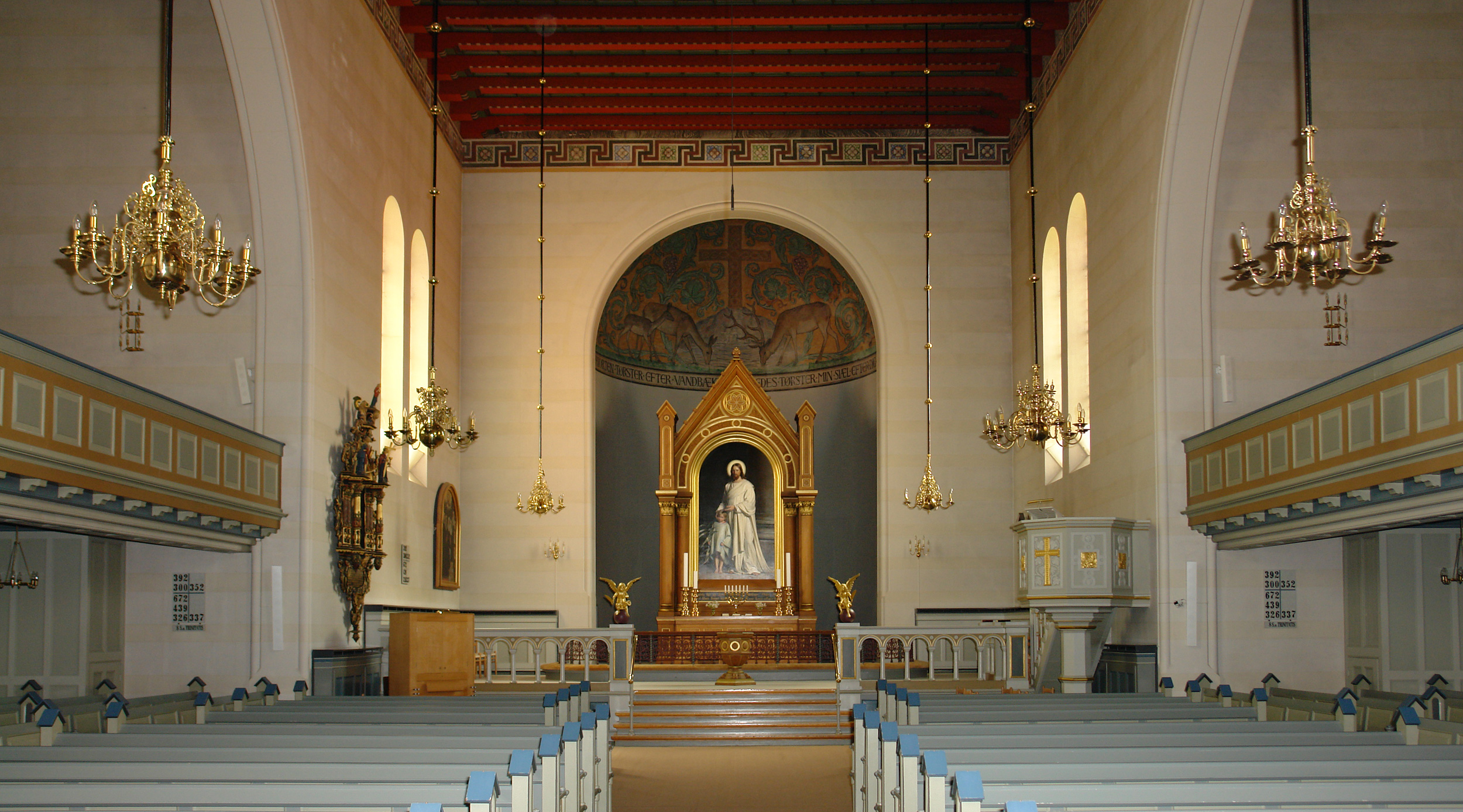 Nikolai Kirche Holbæk, DK: Altarrahmen + Altarschranke + Taufbecken + Kanzel (1872), Altarbild „Jesus und das Kind“ von Carl Bloch (1873), Deckenbild im Chor von Ole Søndergaard (1930)